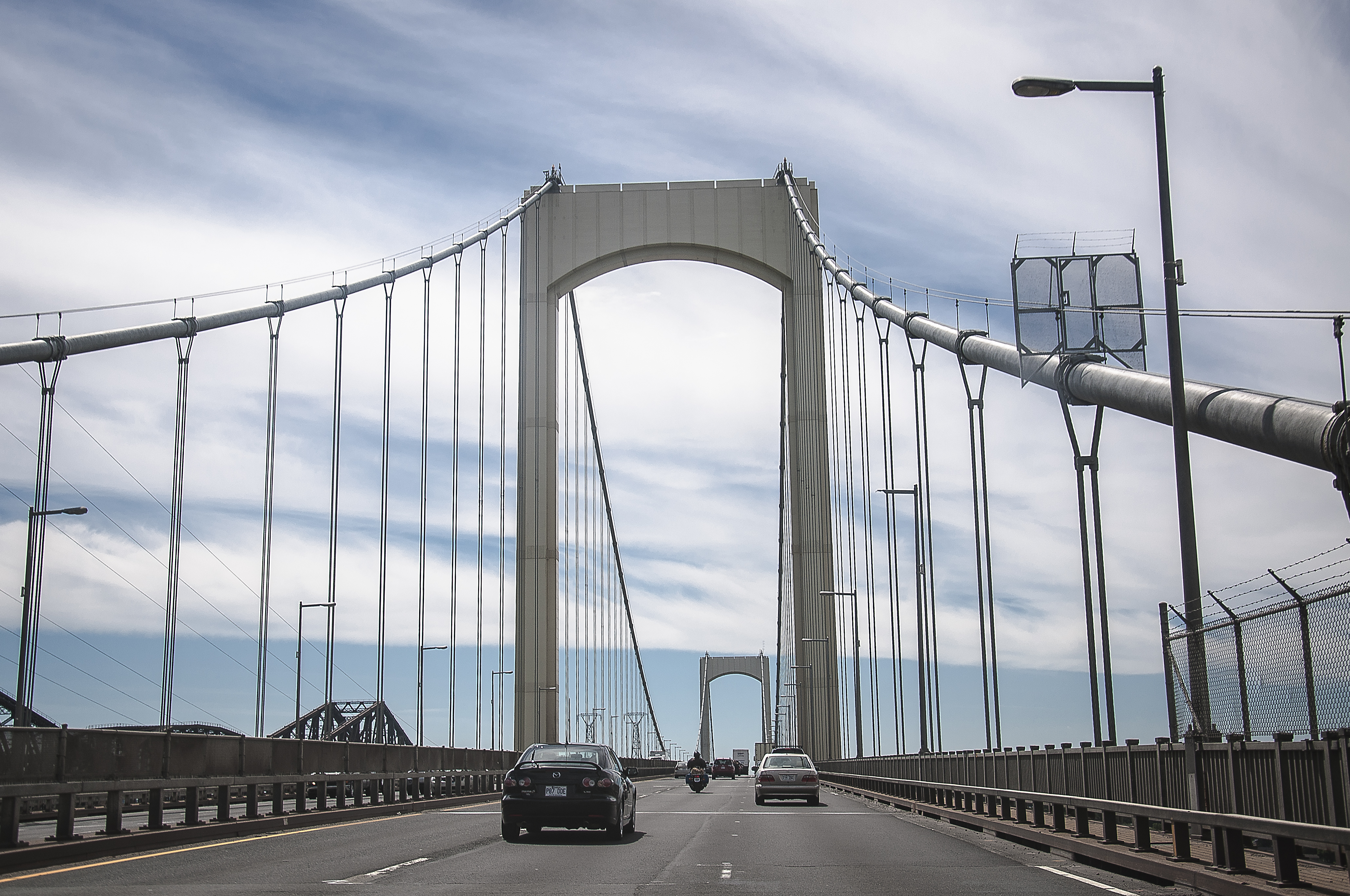 Vu du Pont Pierre-Laporte depuis l'autoroute 73 sud